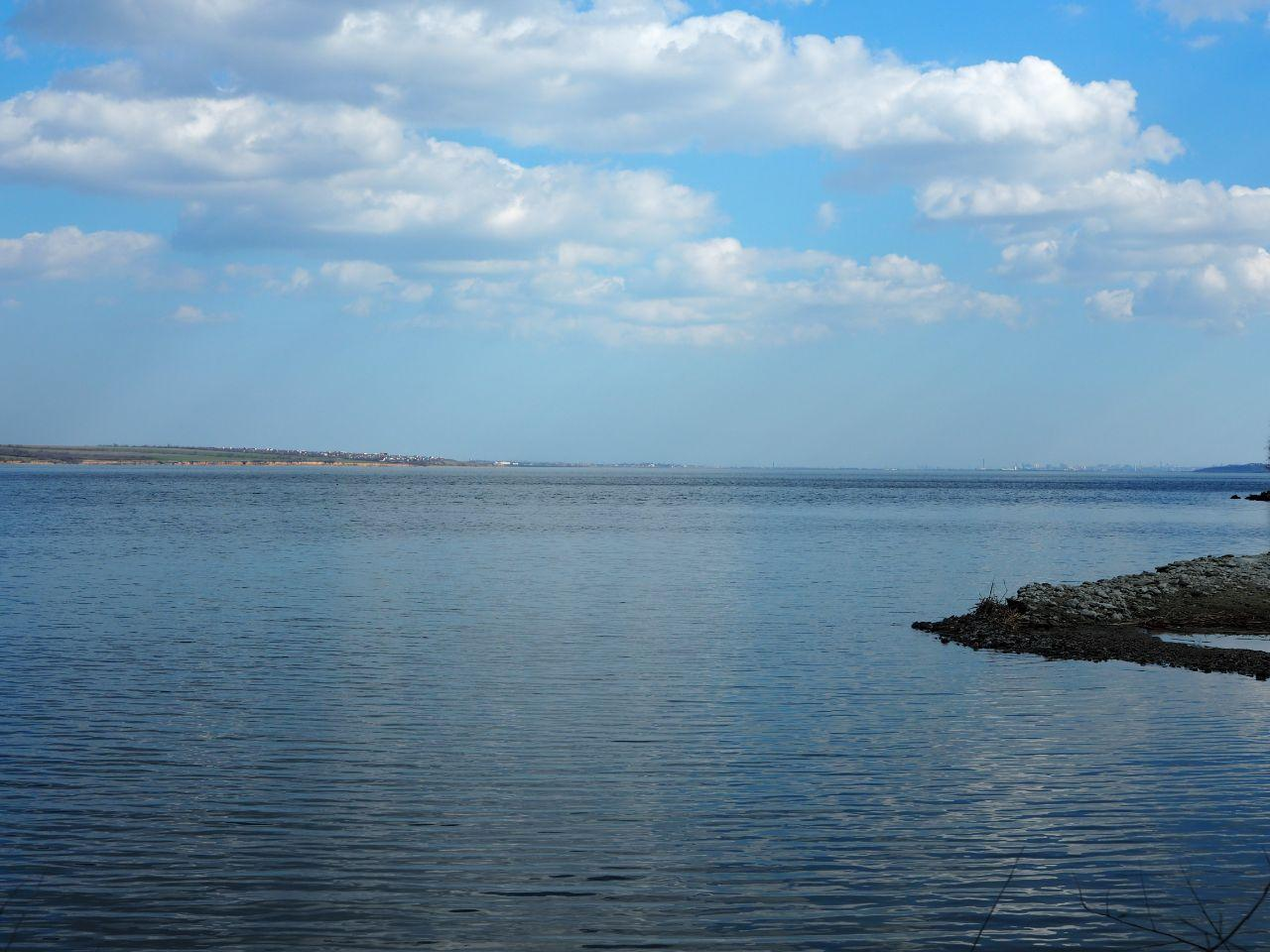 Хаджибейский лиман